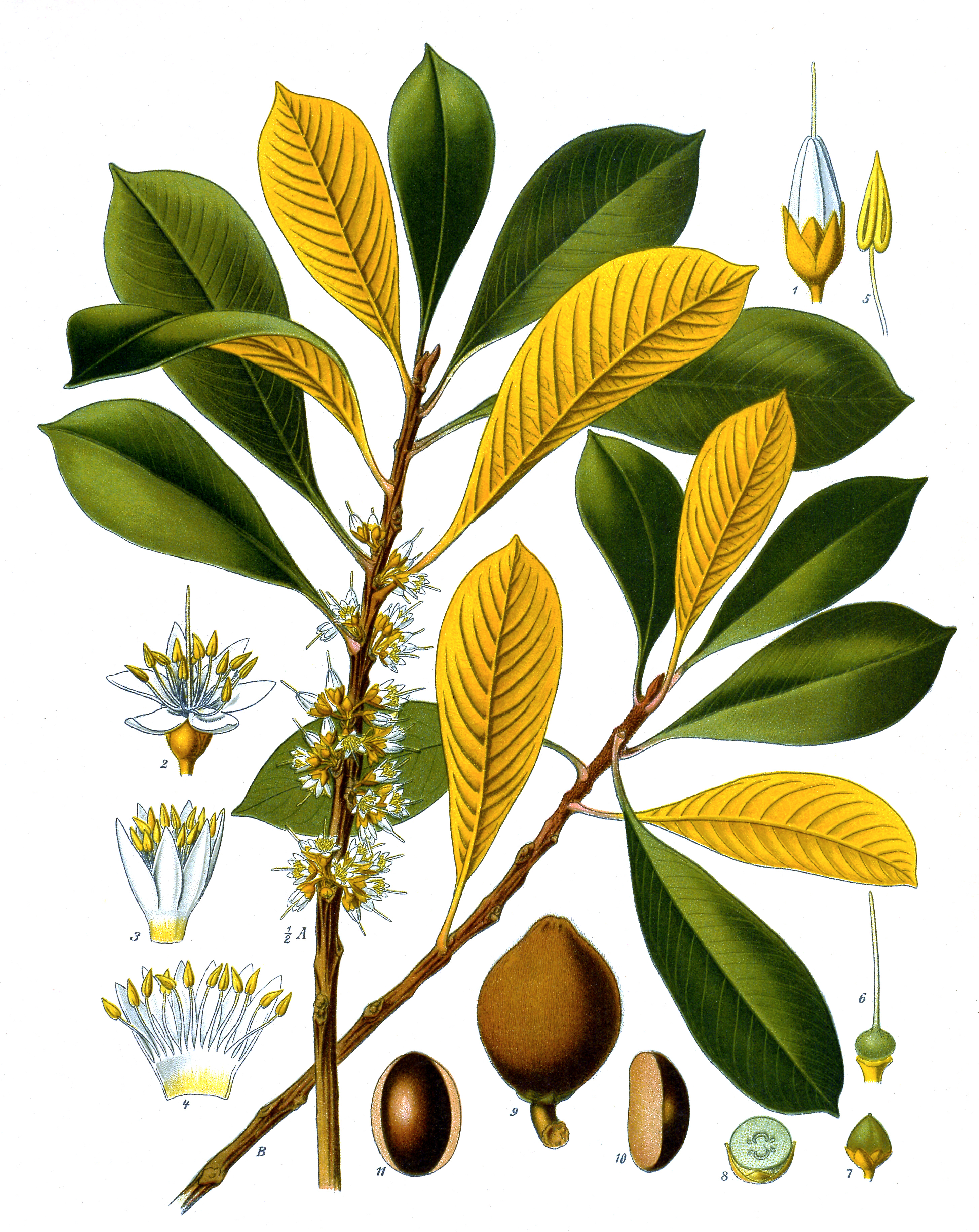 Guttaperchabaum. A Blühender Zweig, 1/2 nat. Grösse, nach dem Original aus dem Kulturgarten in Tijkeumeuk auf Java; getrocknete Pflanze des Herbar Schiffner. — B nicht blühender Zweig, 1/2 nat. Grösse. 1 Knospe 2/1; 2 geöffnete Blüte 2/1; 3 Korolle von aussen 3/2; 4 aufgeschnittene Korolle 3/2; 5 Staubgefäss mehrfach vergr.; 6 Ovar und Griffel, mehrfach vergr.; 7 unreife Frucht; 8 dieselbe im Querschnitt; 9 reife Frucht 1/1; 10 Samen von der Seite 1/1; 11 Samen von hinten gesehen 1/1.